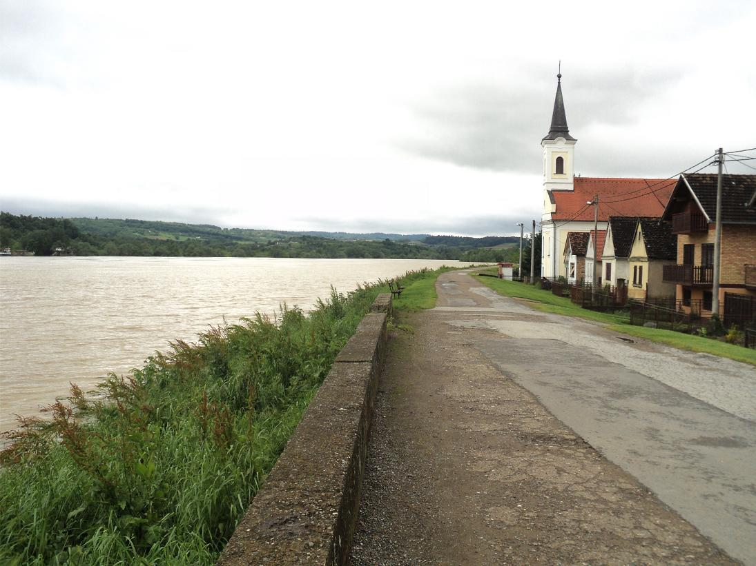 Nabujala rijeka Sava kod Dubočca